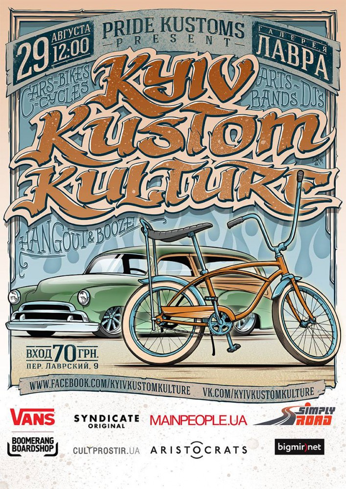 Афіша Kyiv Kustom Kulture 2015 Автор: Дмитрий Тур